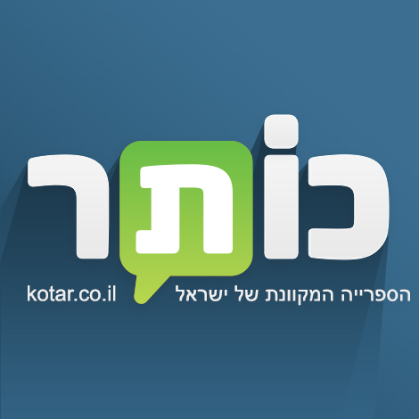 לוגו כותר עיון